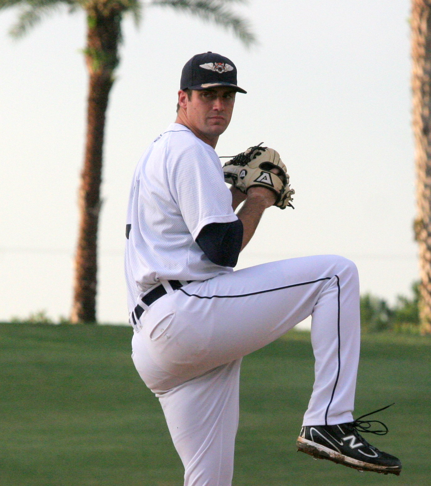 Brian Flynn